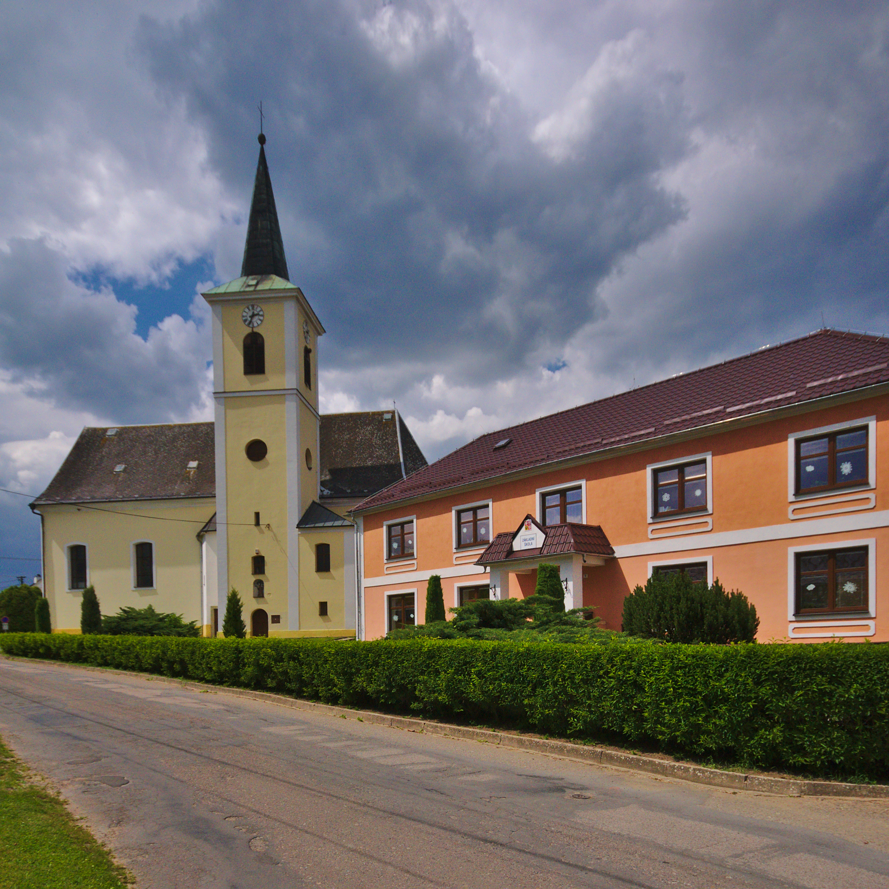 Kostel svaté Kateřiny, Vranová Lhota, okres Svitavy